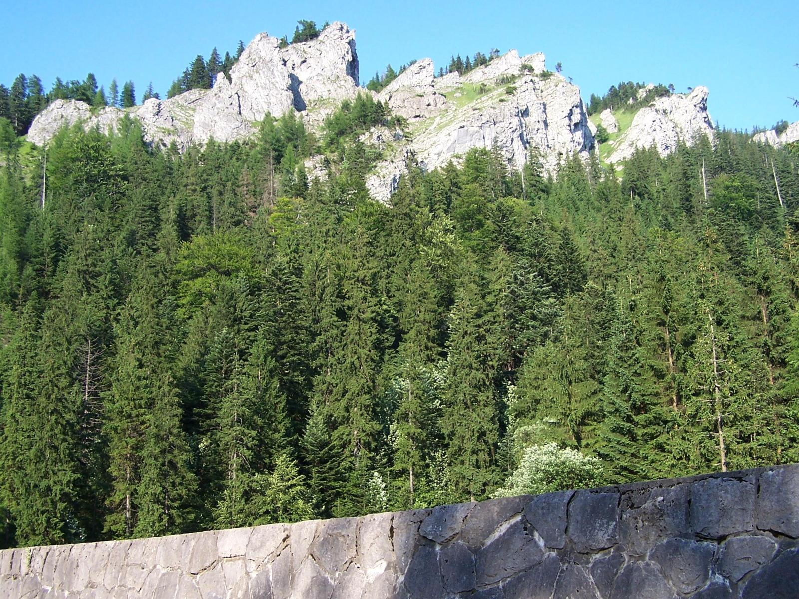 Nosal (Tatra Mountains)